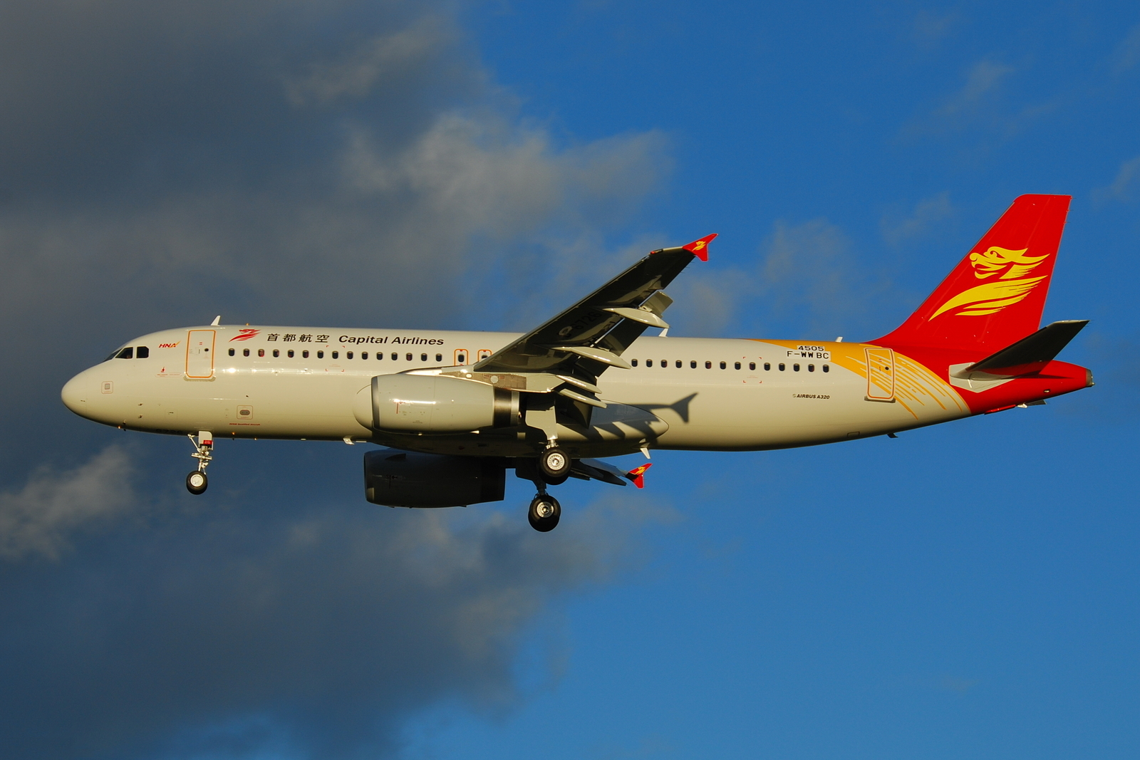 Photo prise à l'aéroport de Toulouse-Blagnac (LFBO) en France. Picture take at Toulouse-Blagnac Airport (LFBO) in France.